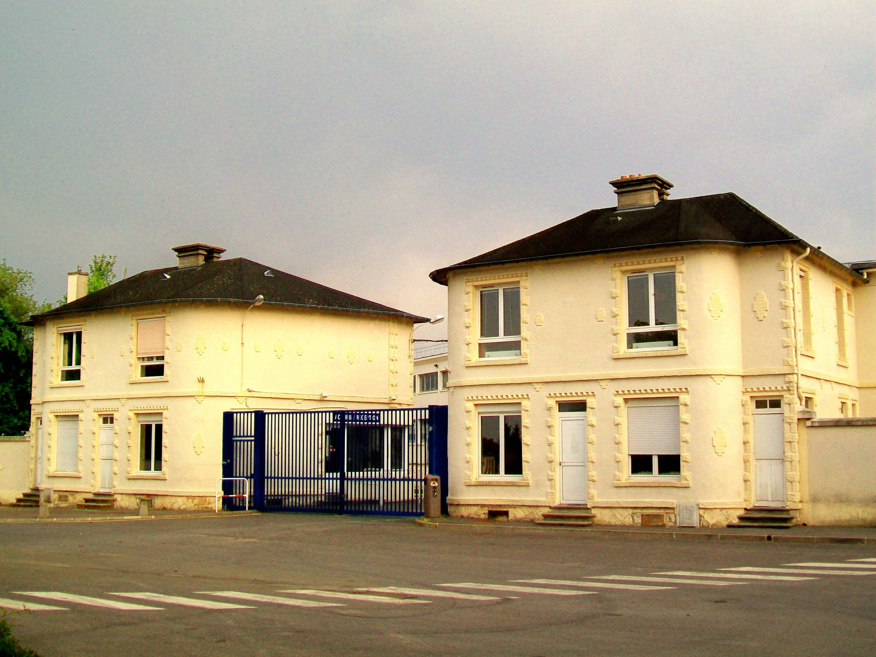 L'entrée de la cartoucherie - NCS Autoliv - avec ses deux pavillons ouvriers de 1926.